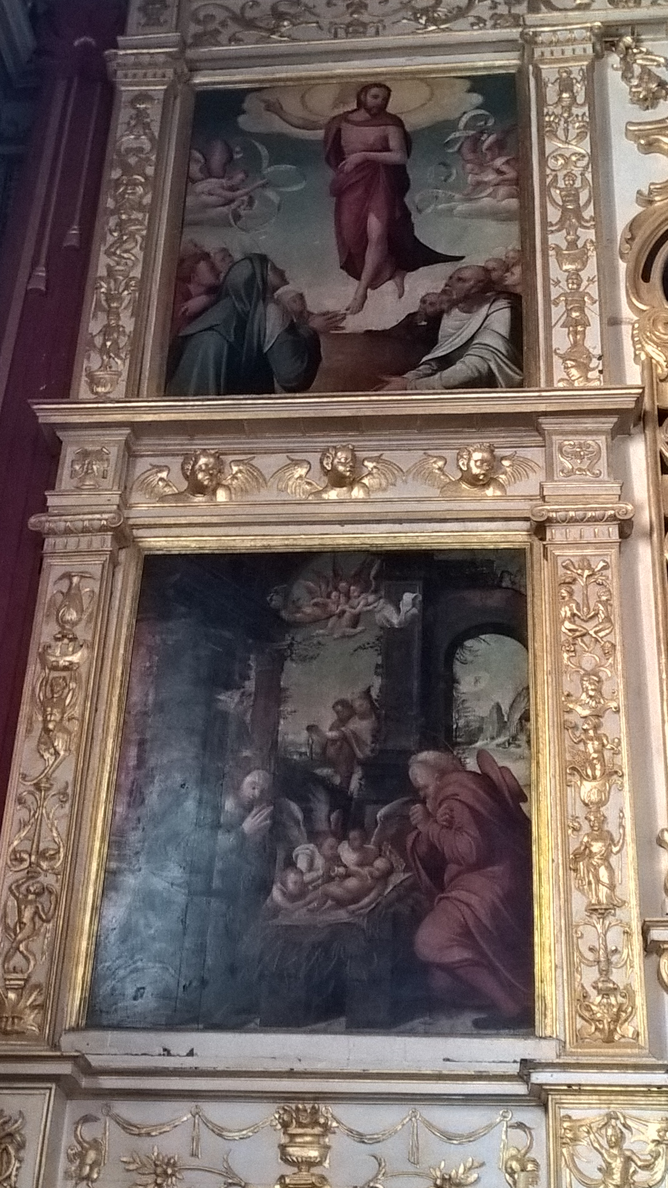 Ascenção de Cristo e Natividade, duas das pinturas do Retábulo do Altar-mor da Igreja Matriz da Ponta do Sol